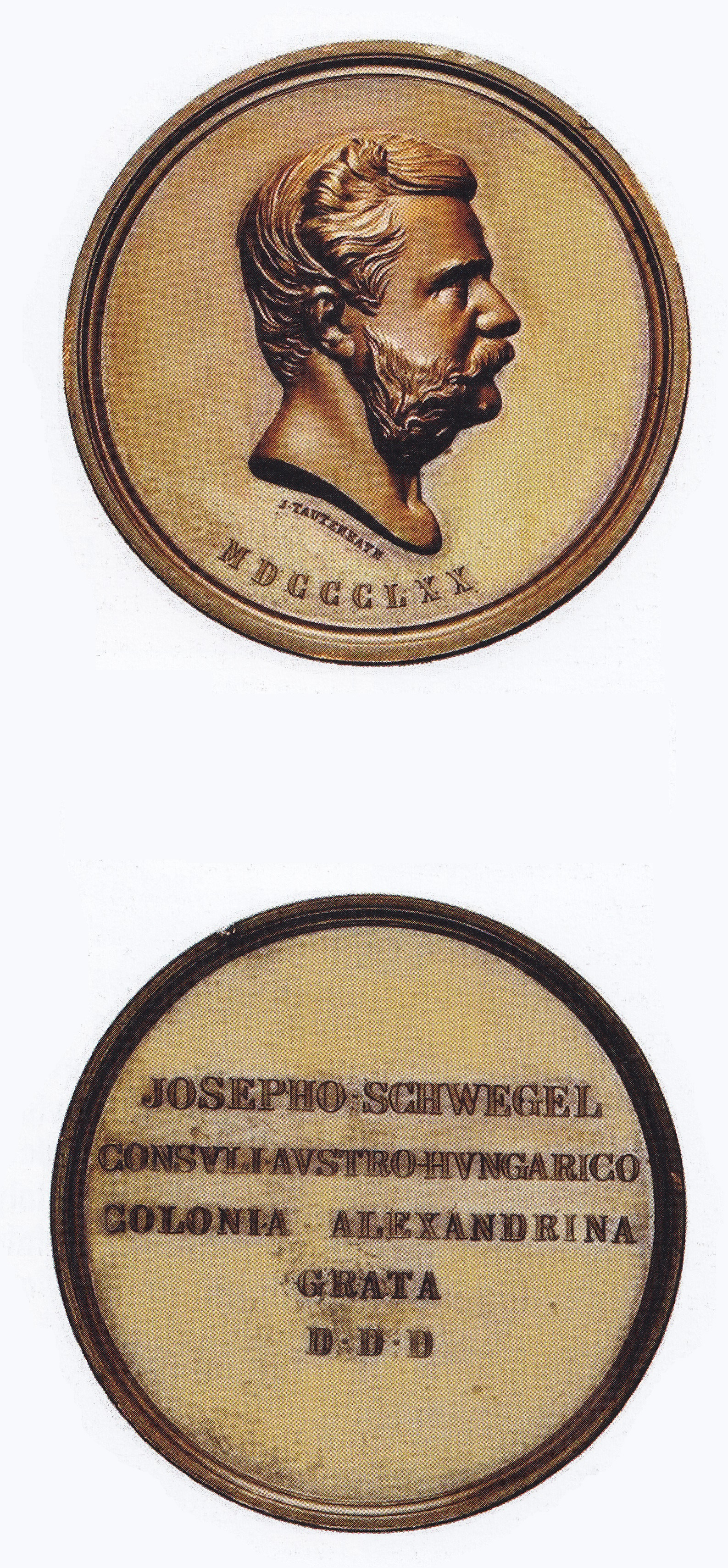 Josef Schwegel konzulátusi emlékérem